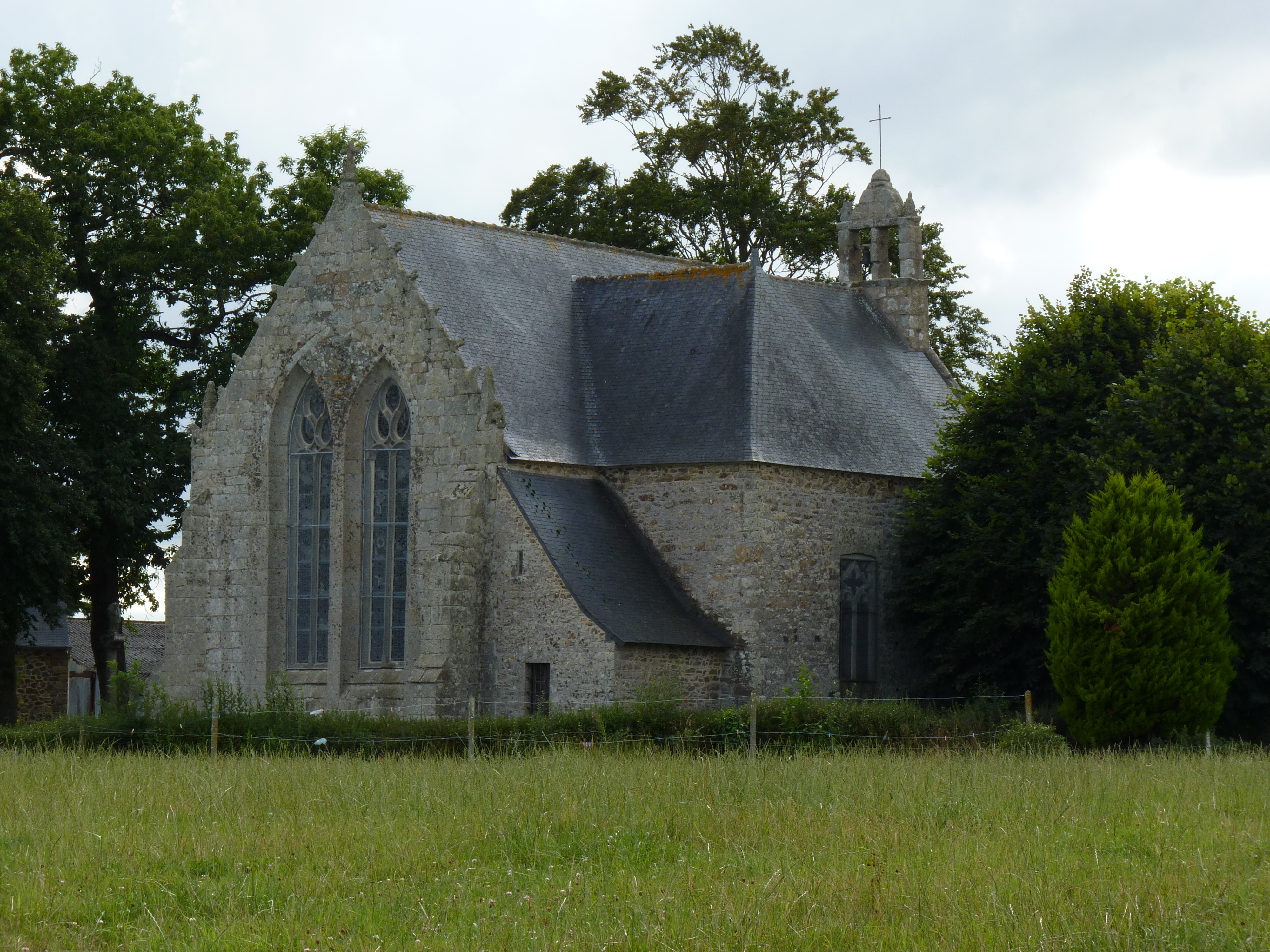 Chapelle et croix du 16ème et 17ème siècles.